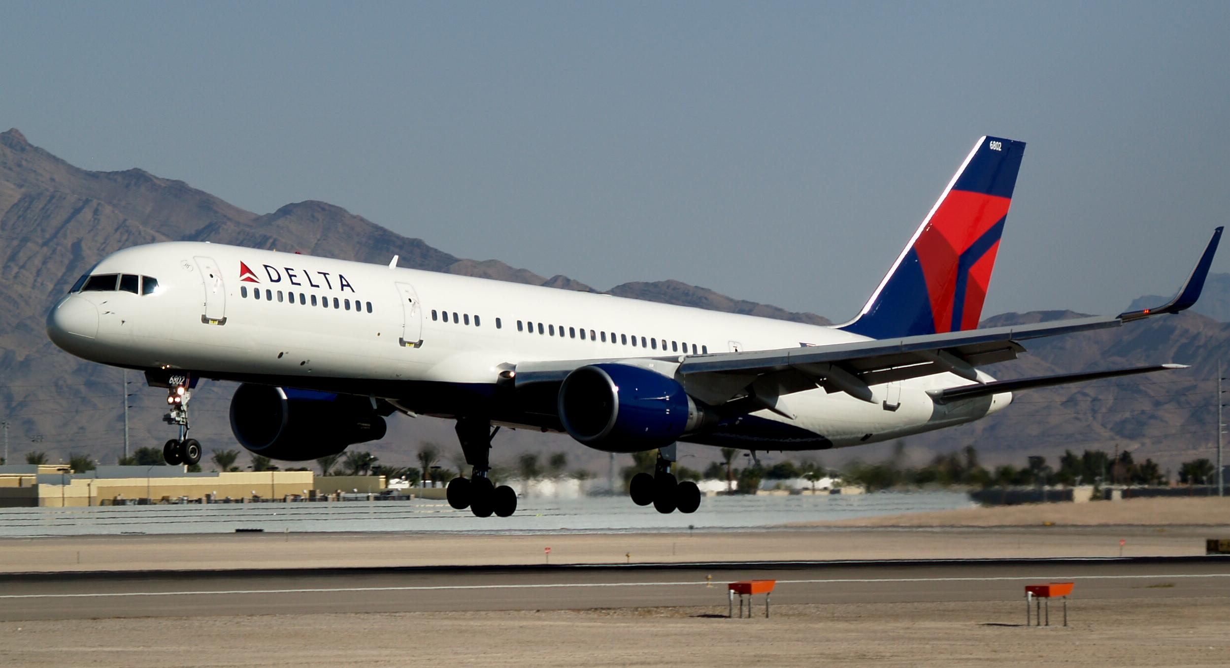 Delta Air Lines Boeing 757-200 (N703TW)